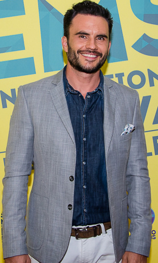 Photo by Jacob Zamora